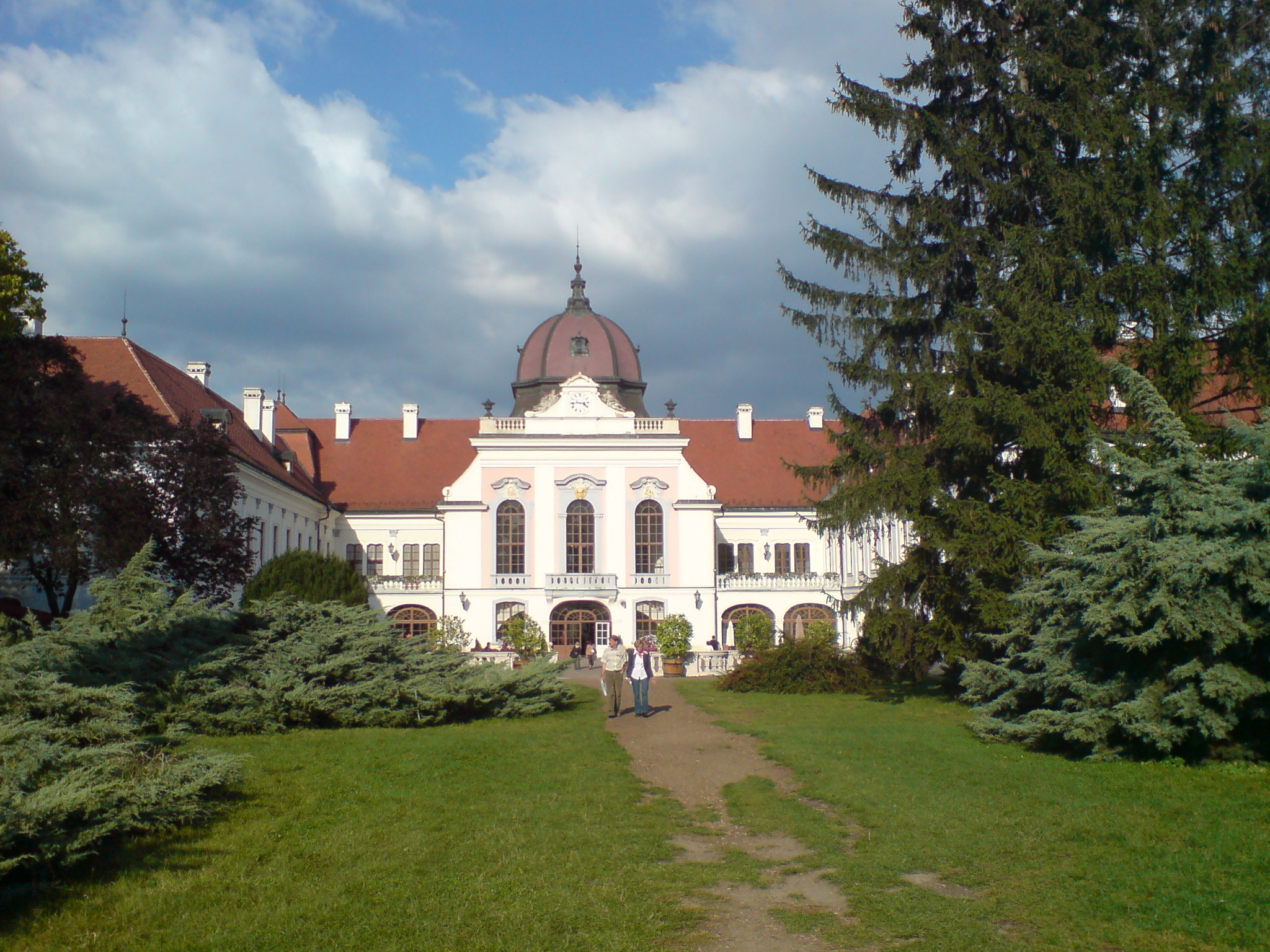 Gödöllö, Schloss, von Westen This is a photo of a monument in Hungary, Identifier: 7051